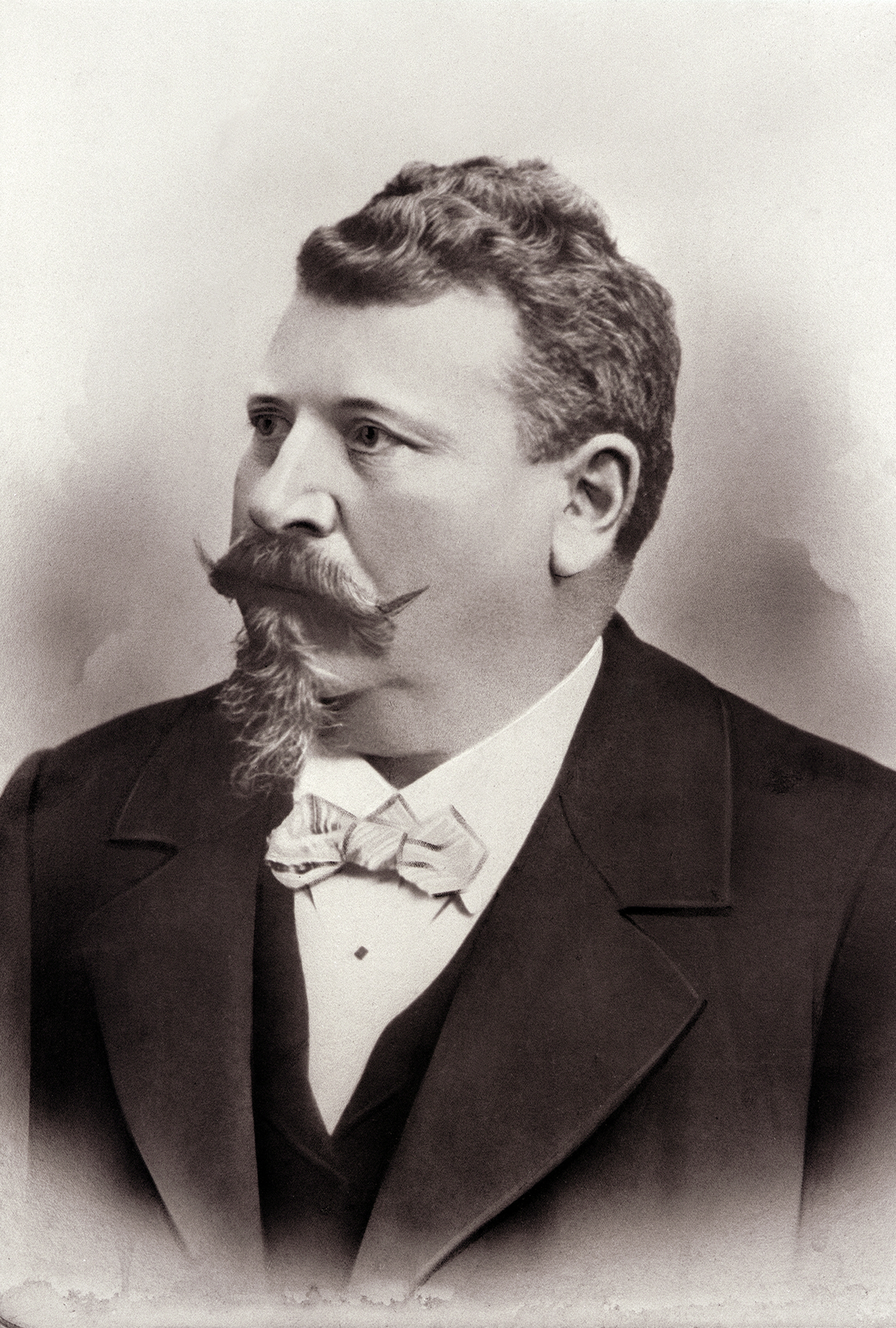 Albert Leitz (1854-1916), Gründer der "Württembergischen Holzbohrerfabrik A. Leitz" in Oberkochen/Ostwürttemberg